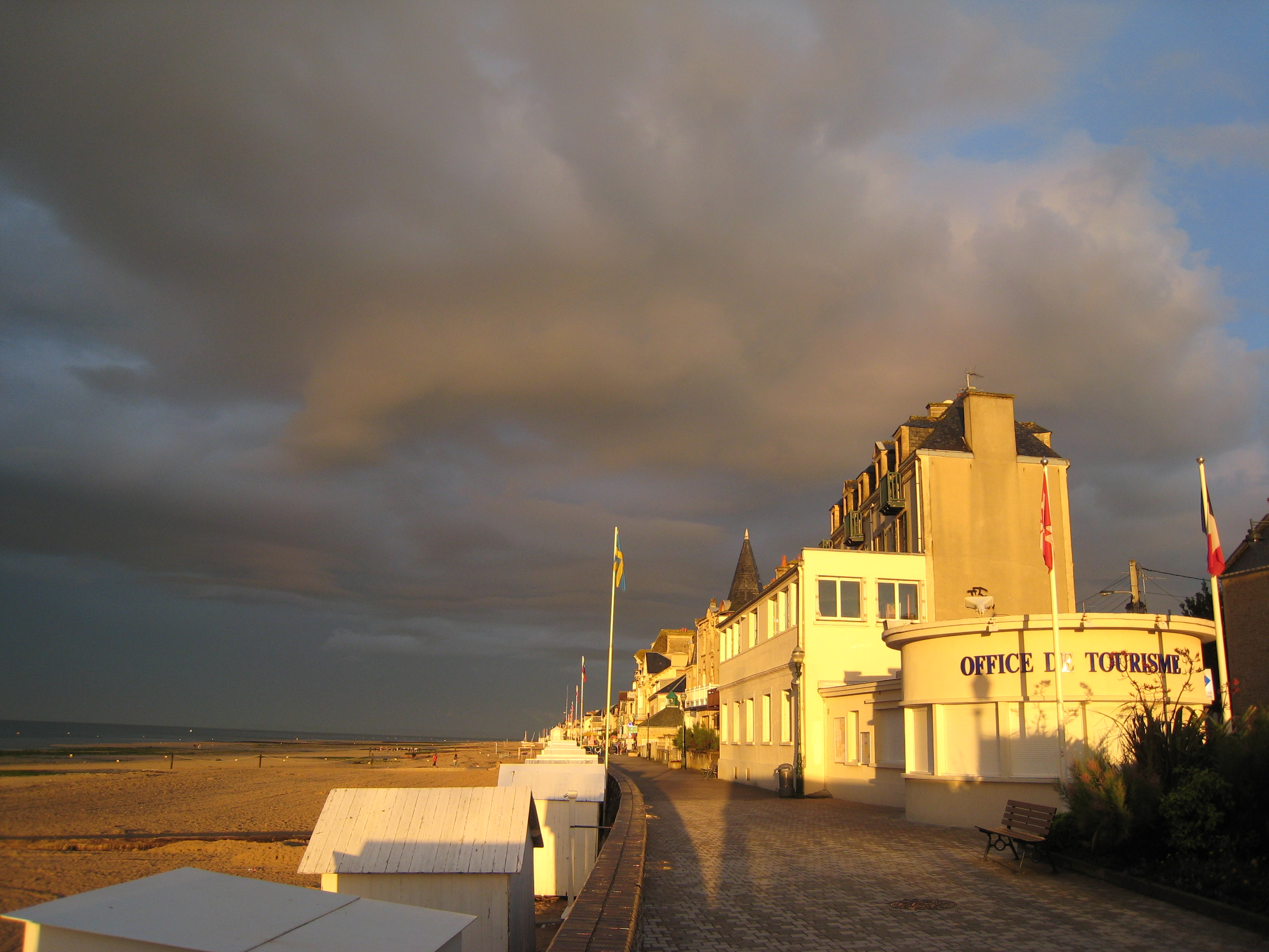 Front de mer de Saint-Aubin sur Mer, Calvados, France